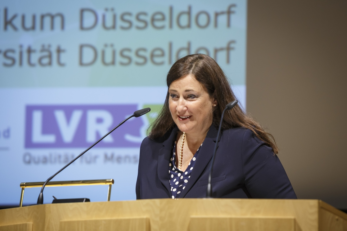 Portrait von Prof. Eva Meisenzahl aufgenommen am 18.05.2017 beim Festsymposium "Psychiatrie und Psychotherapie" anlässlich des 70. Geburtstages von Prof. Dr. Wolfgang Gaebel in der Nordrhein-Westfälischen Akademie der Wissenschaften und der Künste in Düsseldorf.